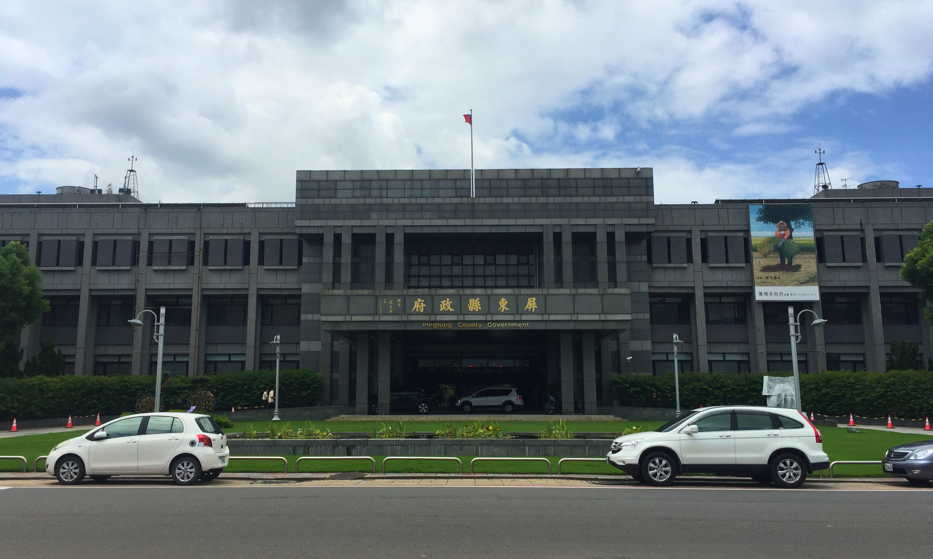 中文（台灣）: 屏東縣政府大樓正面